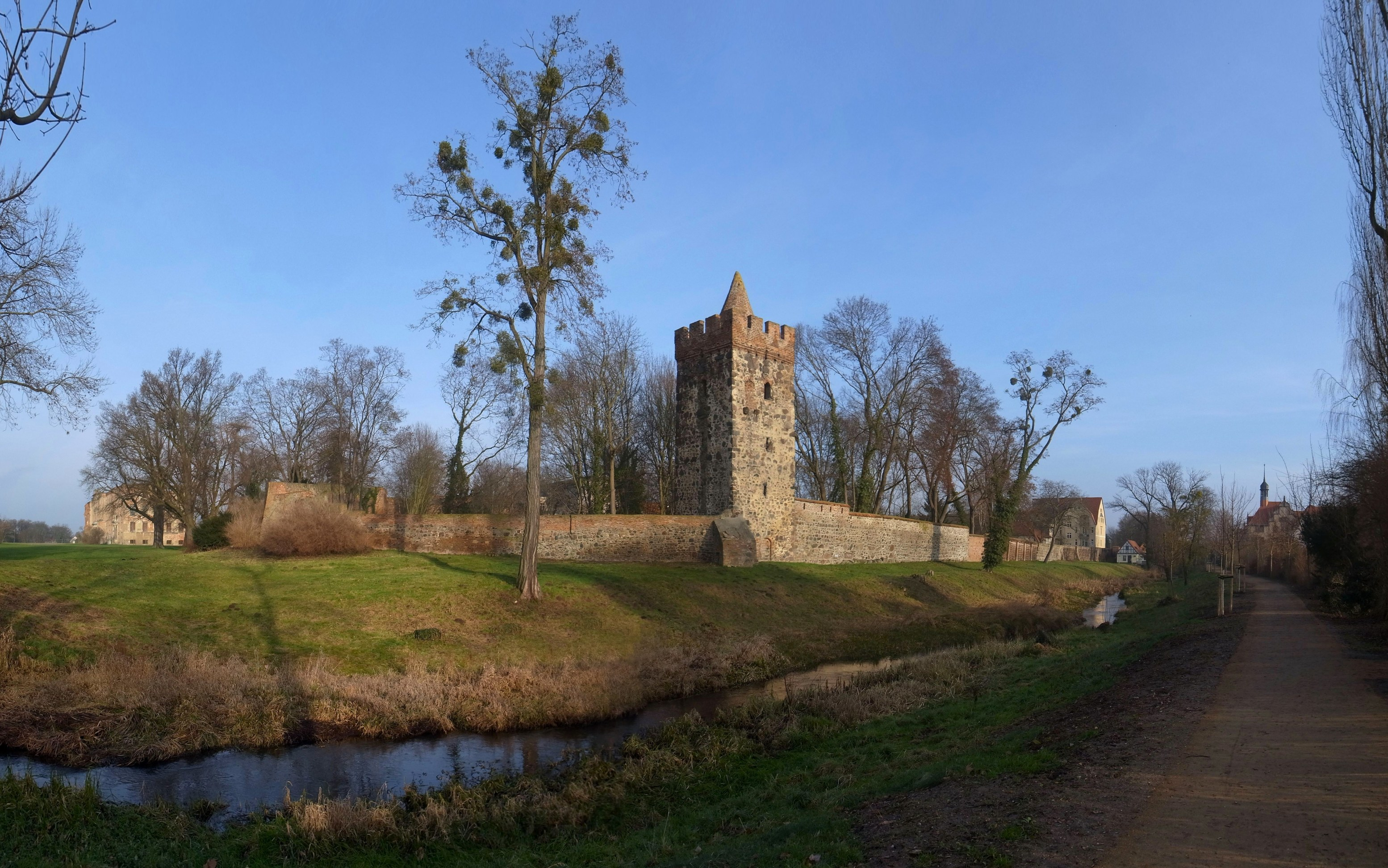 Zerbst (Anhalt), Stadtmauer mit Wehrturm "Kiekinpott"